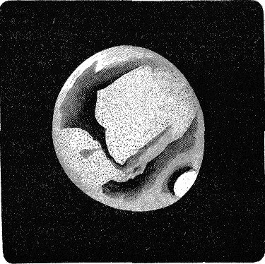 Aspect de la planète Mars en juin 1873. D'après un croquis de M. C. Flammarion pour La Nature, revue des sciences, n° 10, page 145.